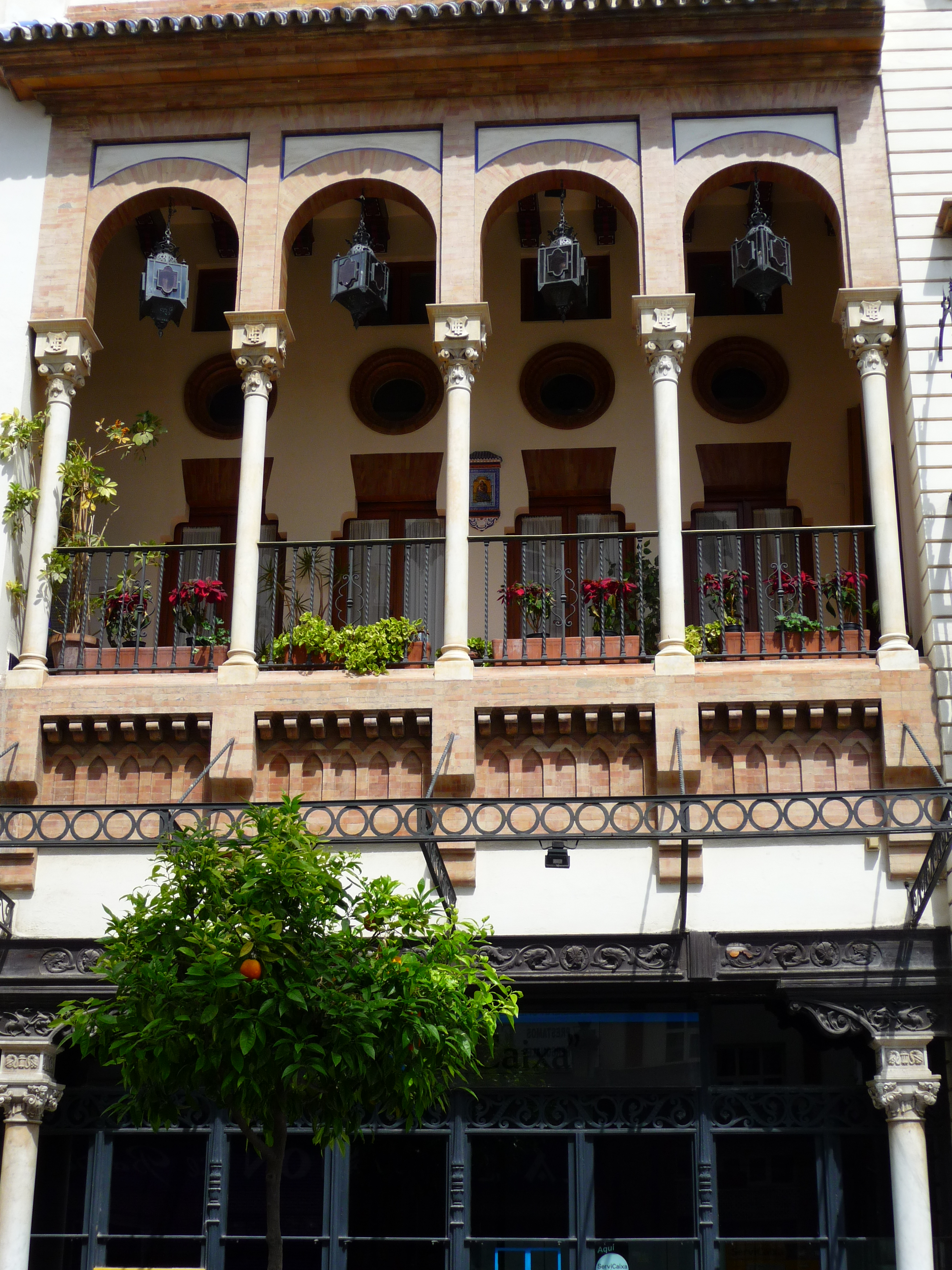 Edificio antiguo comercial de la calle Marina. Huelva (España). Edificio neomudéjar diseñado en 1922 por el arquitecto José María Pérez Carasa.